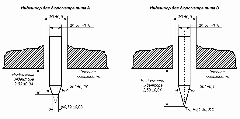 Инденторы для дюрометров типов A и D